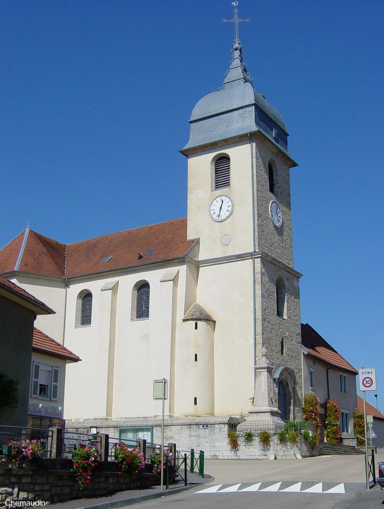 France Doubs Chemaudin Eglise Saint Alban vue depuis son angle sud-est